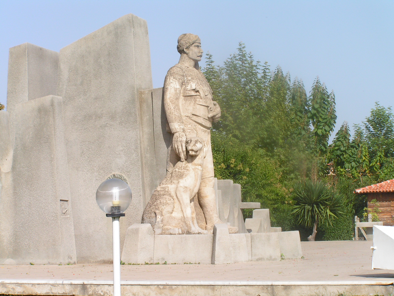 Atçalı Kel Mehmet Efe ve kaidesinin resmi. Kaidenin sol yanında yuvarlak bir kabartma içinde "Vali-i Vilayet, Hademe-i Devlet, Atçalı Kel Memet" yazmaktadır.